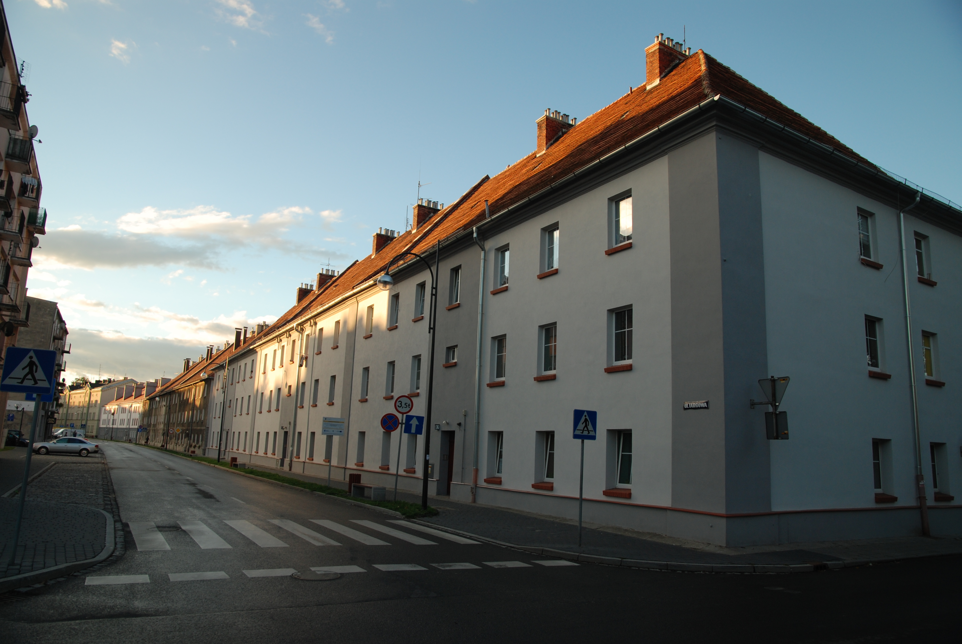 Kędzierzyn-Koźle - Zespół koszar, obecnie domy nieszkalne na ul. Targowej 13/15, 17/21, 23/27 OP